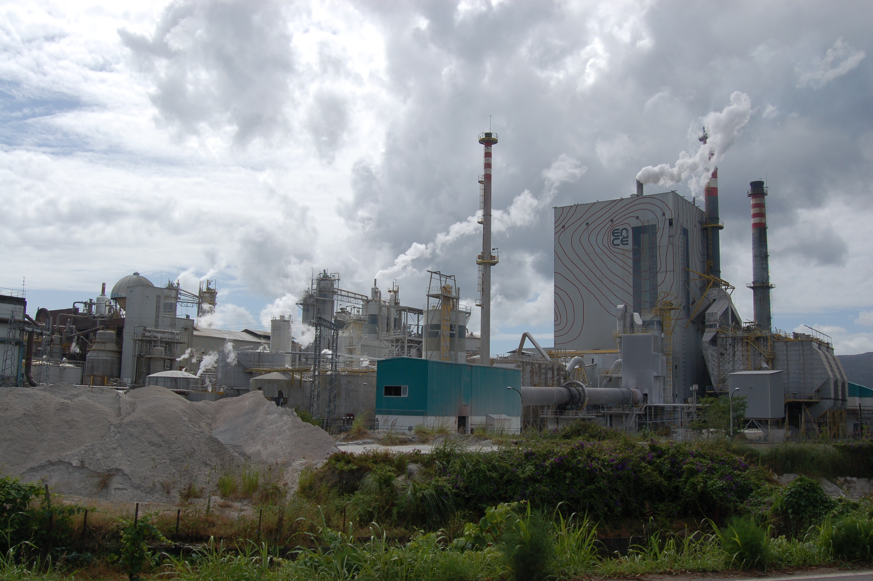 Factoría de Ence na papeleira de Pontevedra, en Lourizán (Pontevedra)